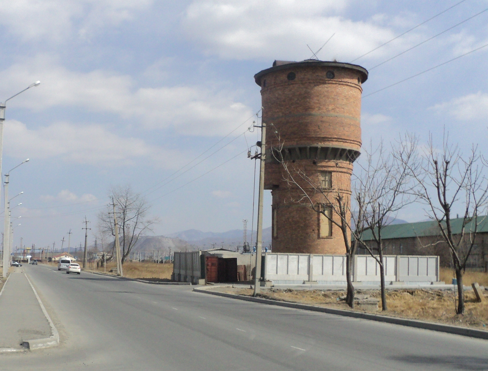 Водонапорная башня «Находка-Водоканал»